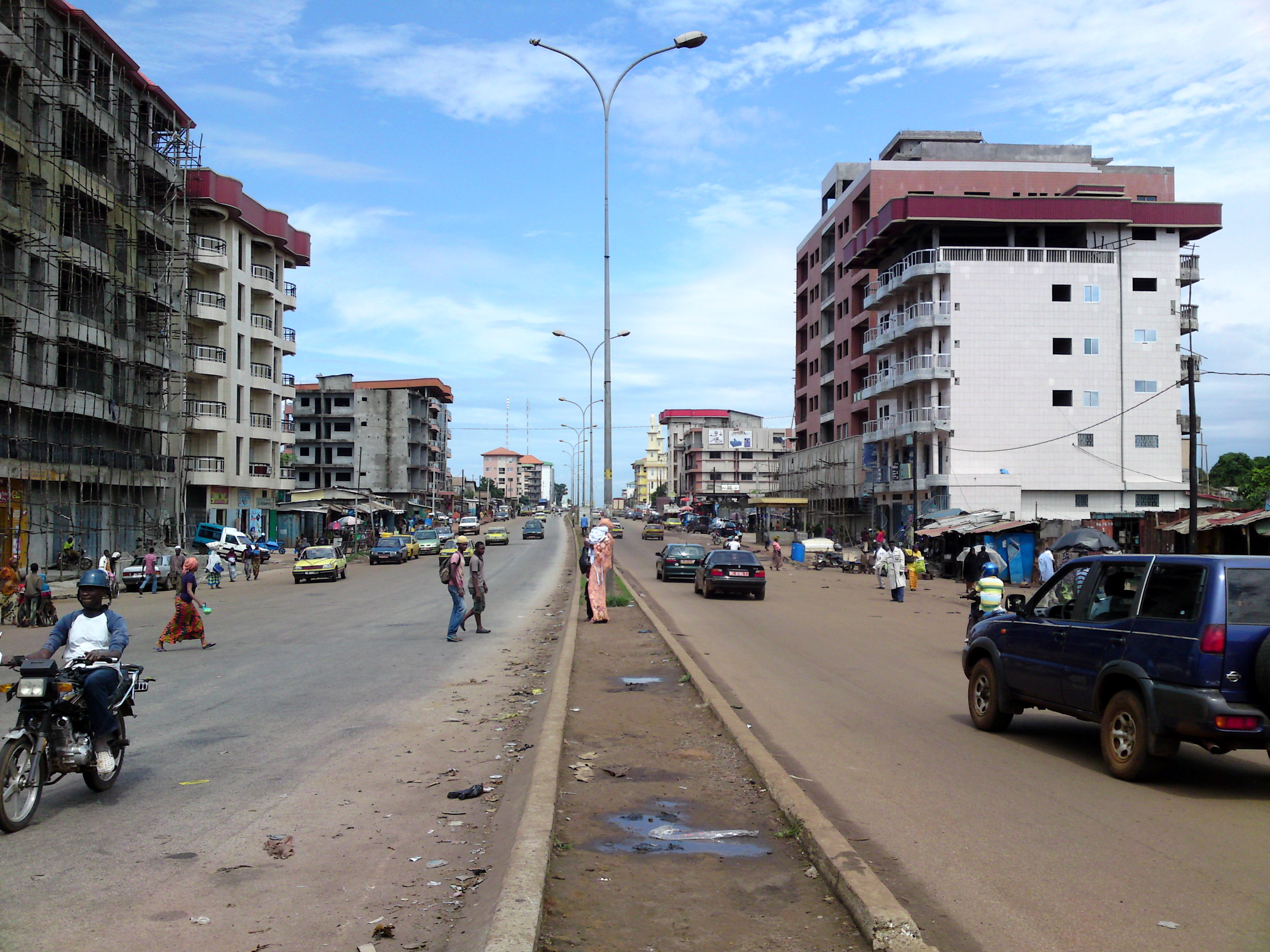 Conakry